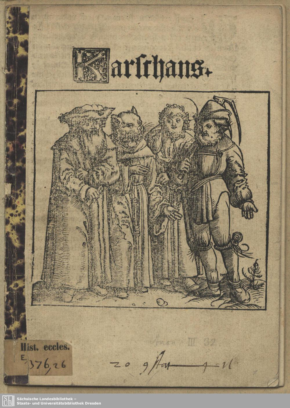 Titelholzschnitt zum Karsthans-Dialog, Straßburg 1521